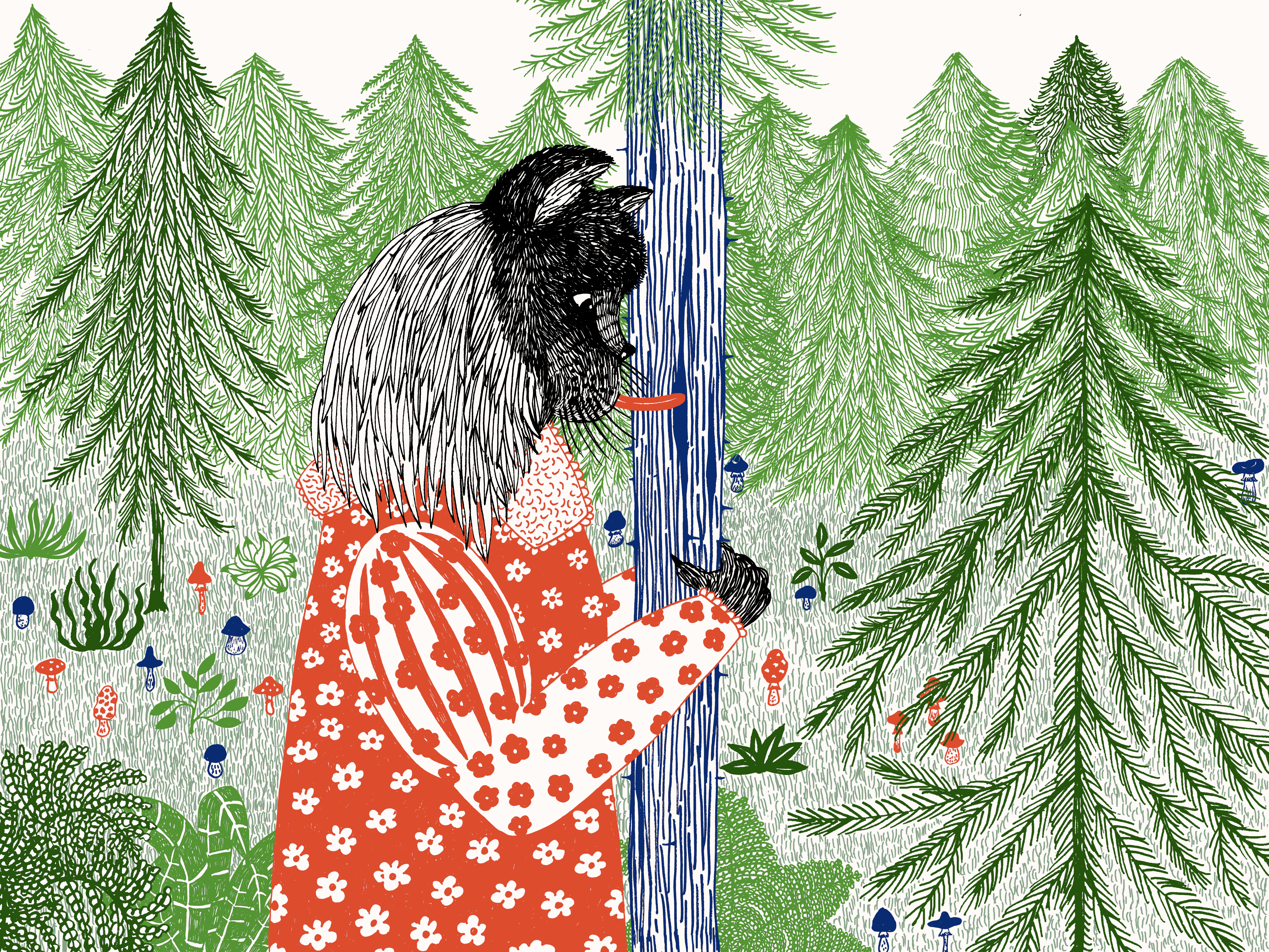 Grafika Kasi Walentynowicz przedstawiająca zmorę – postać z polskiej demonologii ludowej – w postaci kota duszącą drzewo. Grafika ilustruje tekst Oskara Kolberga opublikowany w tomach Wielkie Księstwo Poznańskie, Cz. 7, Krakowskie, cz. 3, Radomskie, Cz. 2